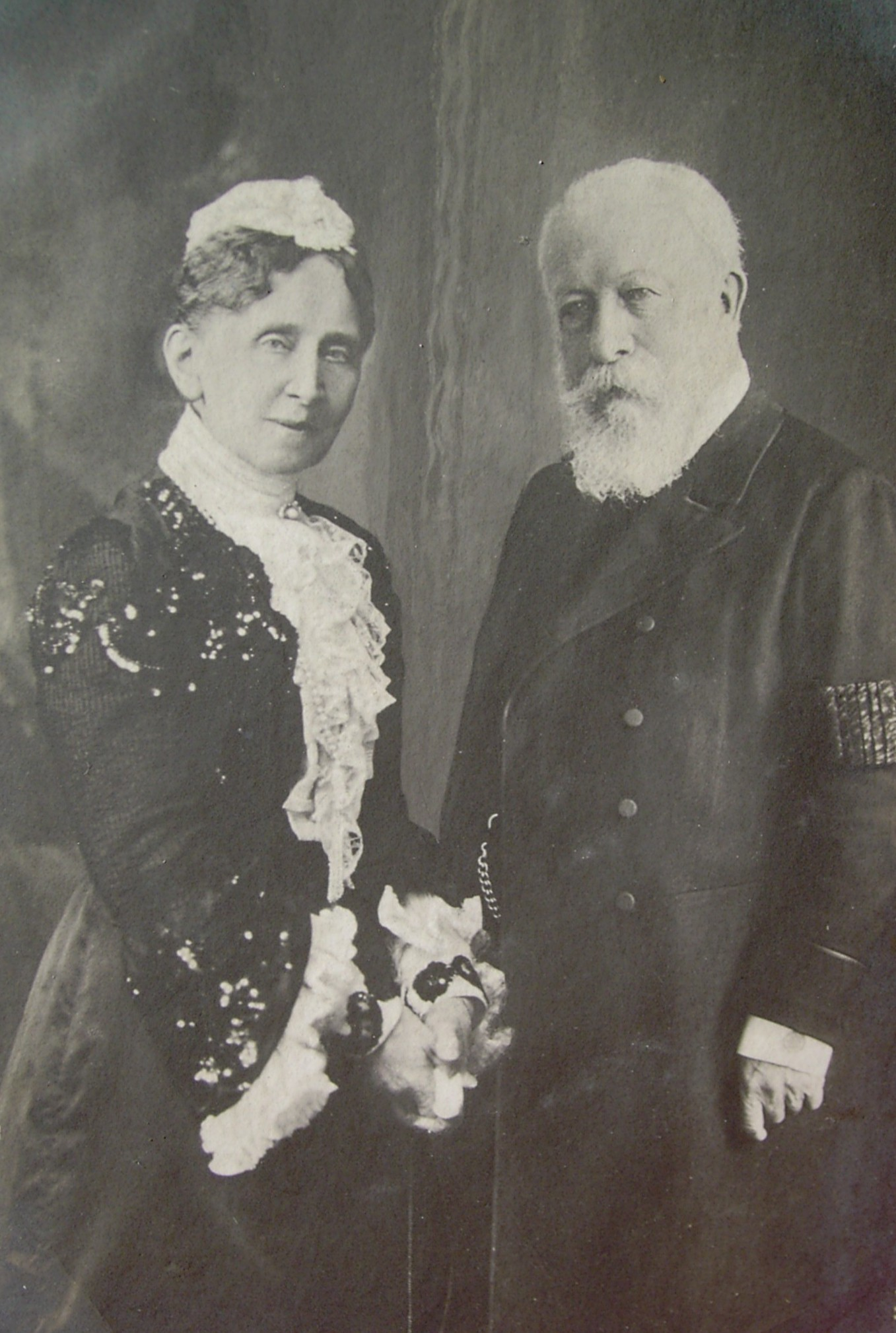 Großherzog Friedrich I. von Baden (1826–1907) und Großherzogin Luise von Baden, Prinzessin von Preußen (1838–1923) im Jahr der Goldenen Hochzeit. Der Großherzog trägt einen dunklen zweireihigen Gehrock.